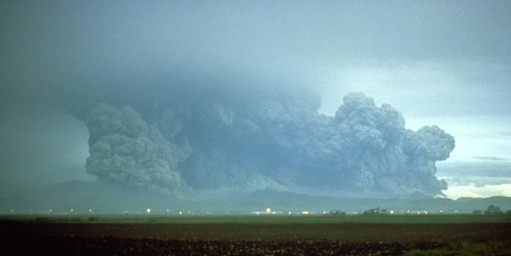 Der Pinatubo am Morgen 15. Juni 1991 von der Clark Air Base aus gesehen. Durch den Taifun Yunya ist die Eruptionssäule fast waagerecht. Copyright info